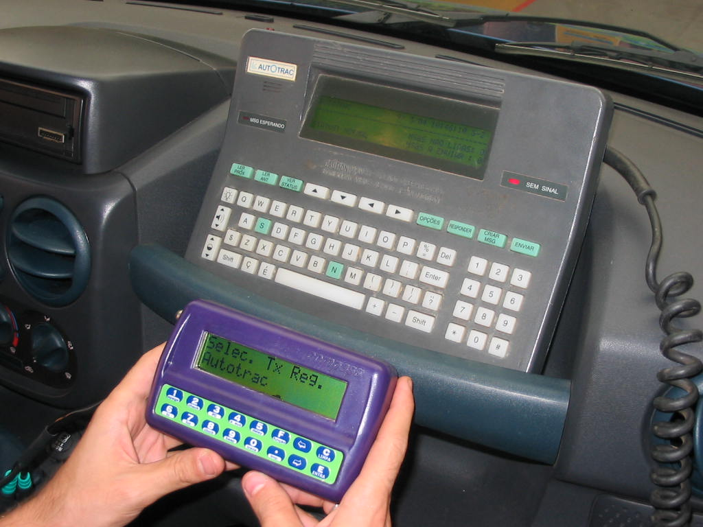 Módulo de comunicação Autotrac e Coletor de dados Compass modelo 2005